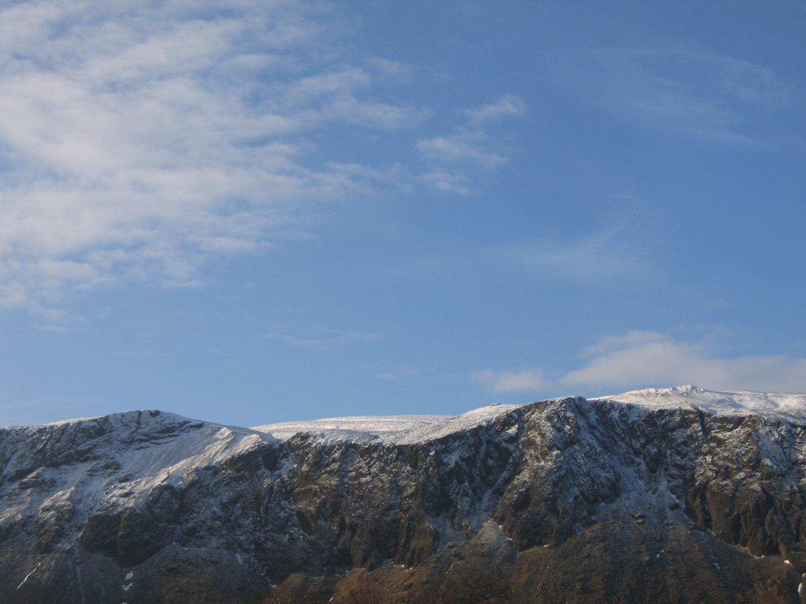 Lýsing Ingólfsfjall á fallegum degi. Sara Dögg Febrúar 2007